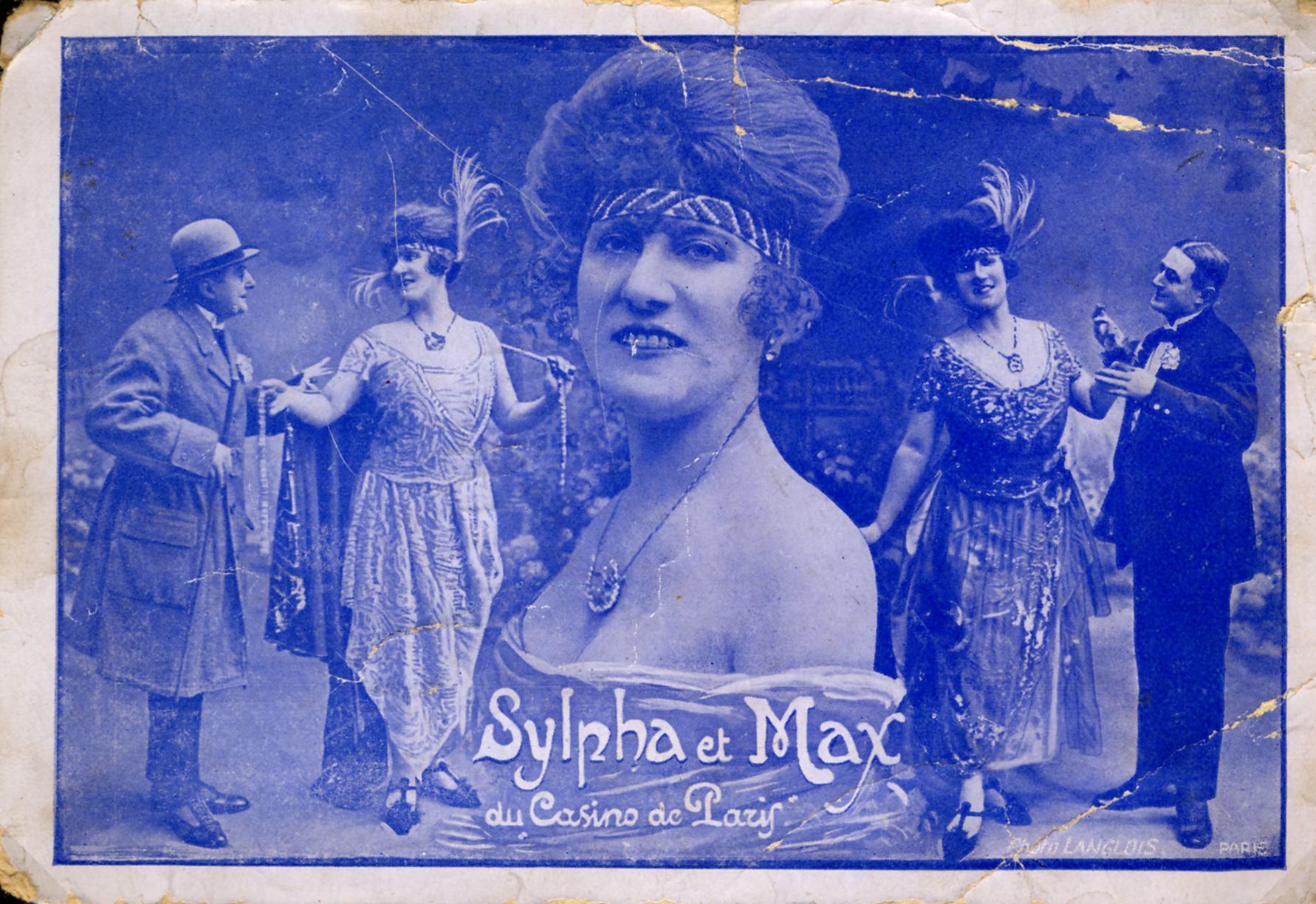 Carton d'invitation pour les représentations au Casino de Paris.